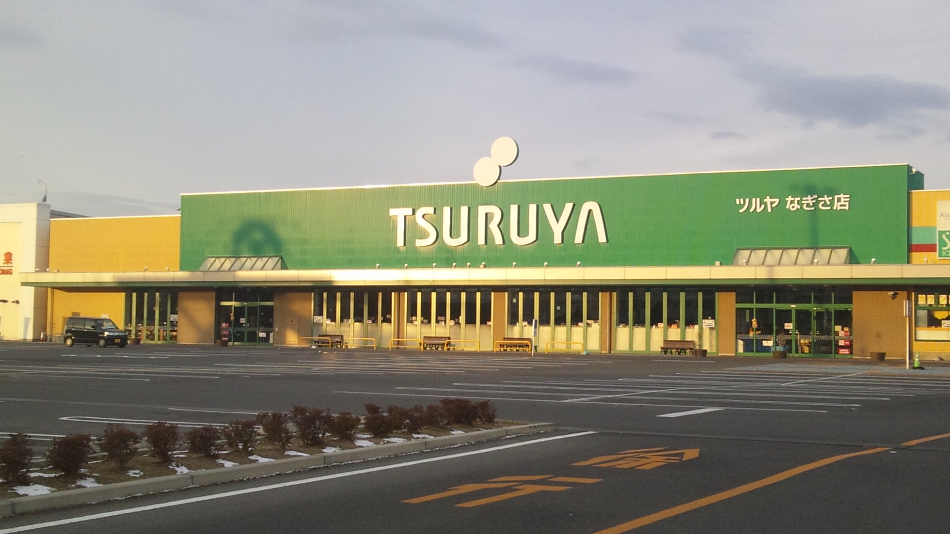 ２０１２年 初日の出